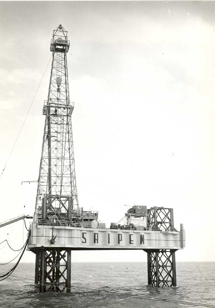 1959 primo pozzo offhore in Europa - Gela mare 21